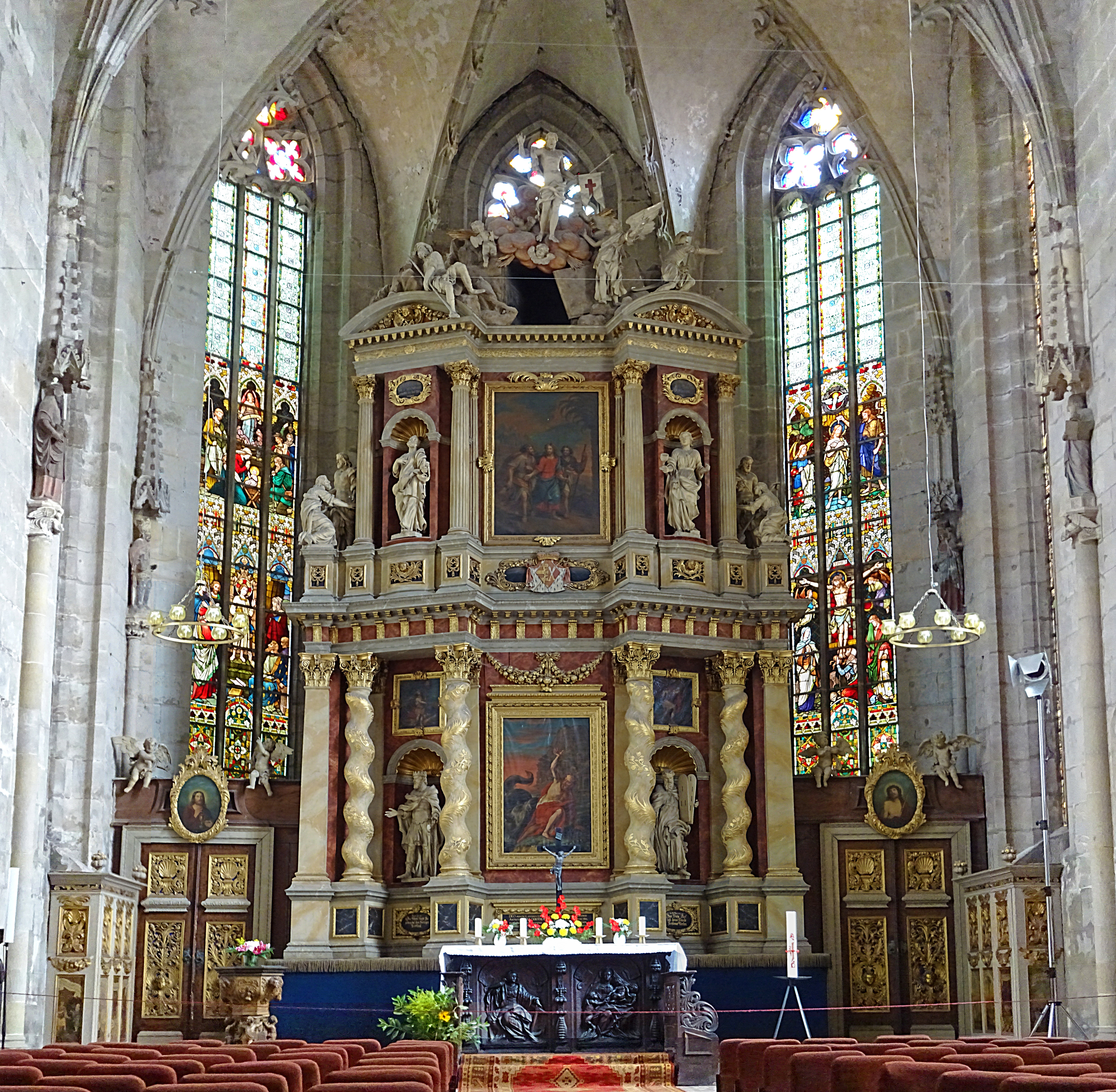 Marktkirche St. Benedikti (Quedlinburg), der Hochaltar von 1700 thematisiert das Ostergeschehen.